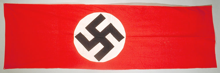 La bannière a été récupérée à Rennes, place de la Mairie, le 4 août 1944.